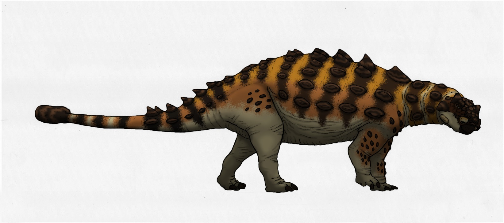 Akainacephalus johnsoni. 2019. Credits to Jelle P. Wiersma​ and Randall B. Irmis.